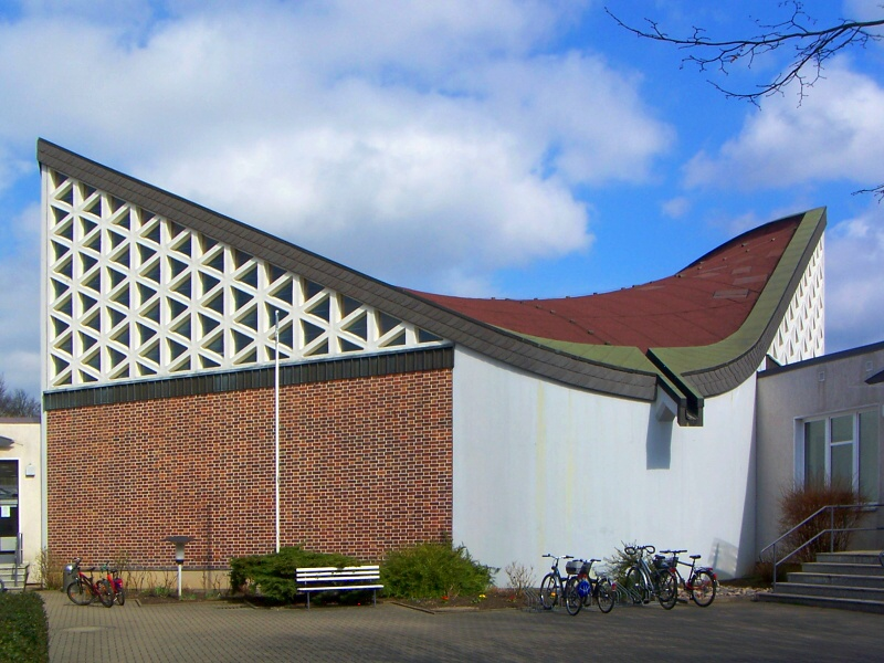 Katholische Kirche in Rostock, An den Polizeigärten